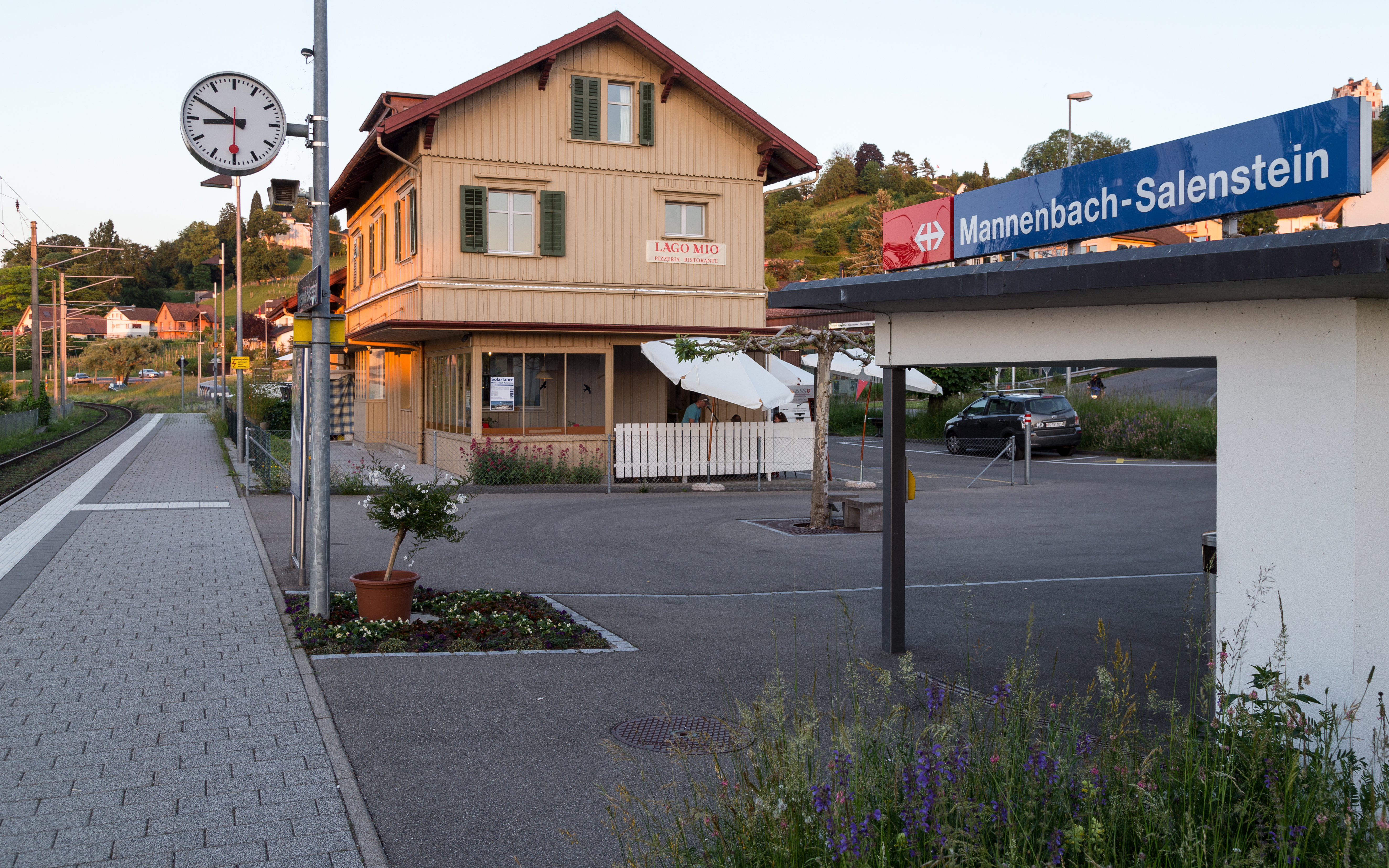 SBB-Station Mannenbach-Salenstein. Das ursprüngliche Bahnhofsgebäude wird heute gastronomisch genutzt.